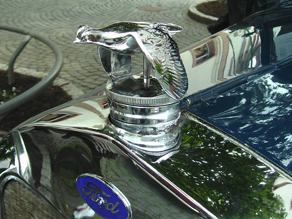 Ford A Phaeton de Luxe (1929): Kühlerfigur